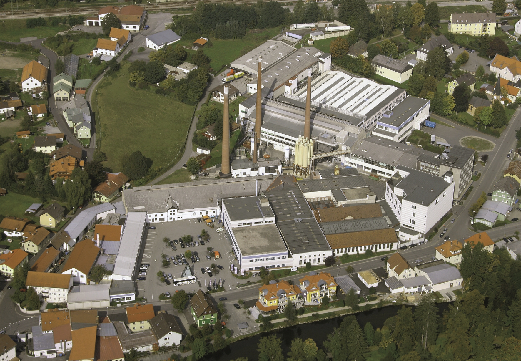 Das Gelände der Zwiesel Kristallglas AG aus der Luft.